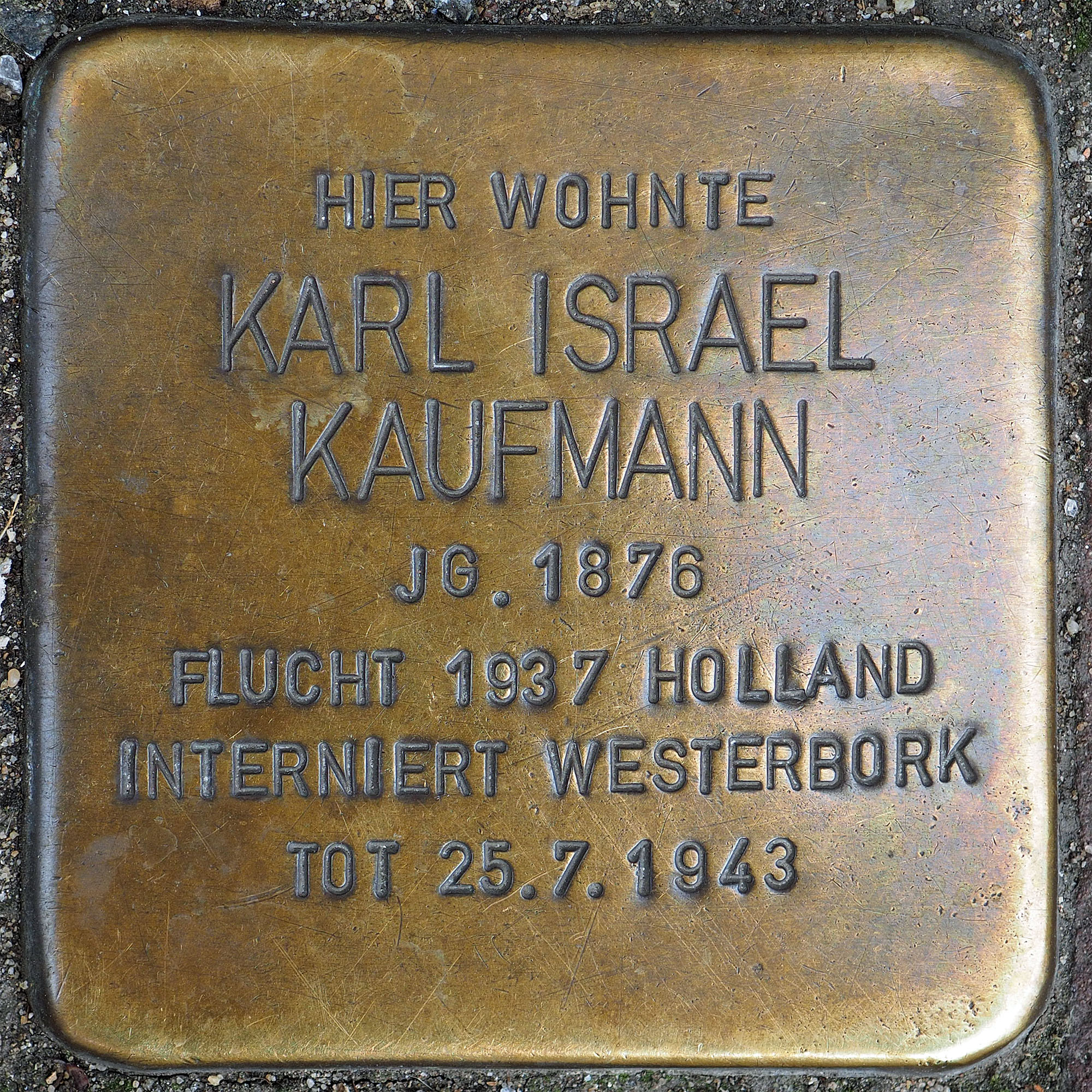 Stolperstein Geldern Hartstraße 2 Karl Israel Kaufmann